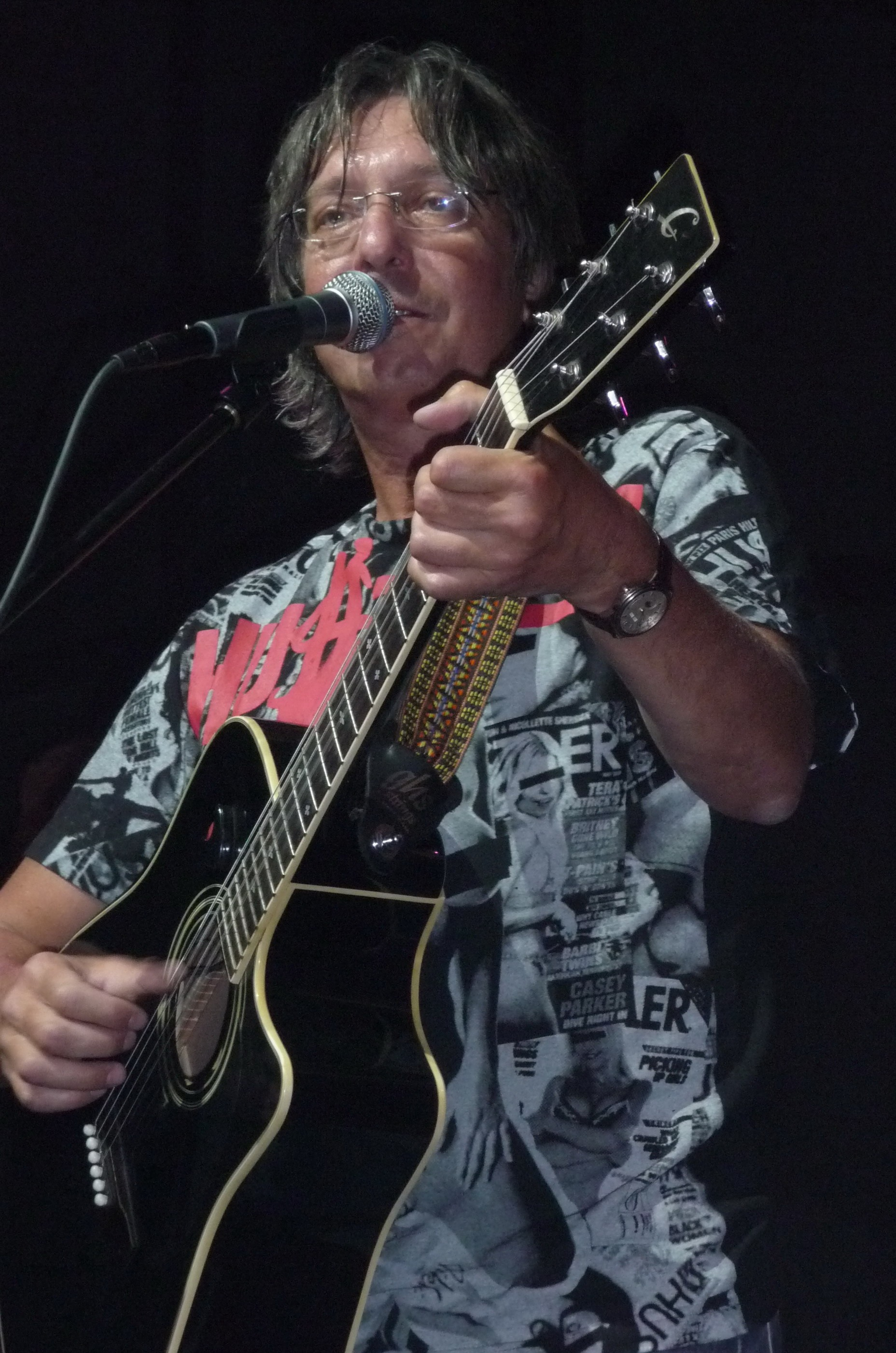 Андрей Заблудовский в клубе JAGGER